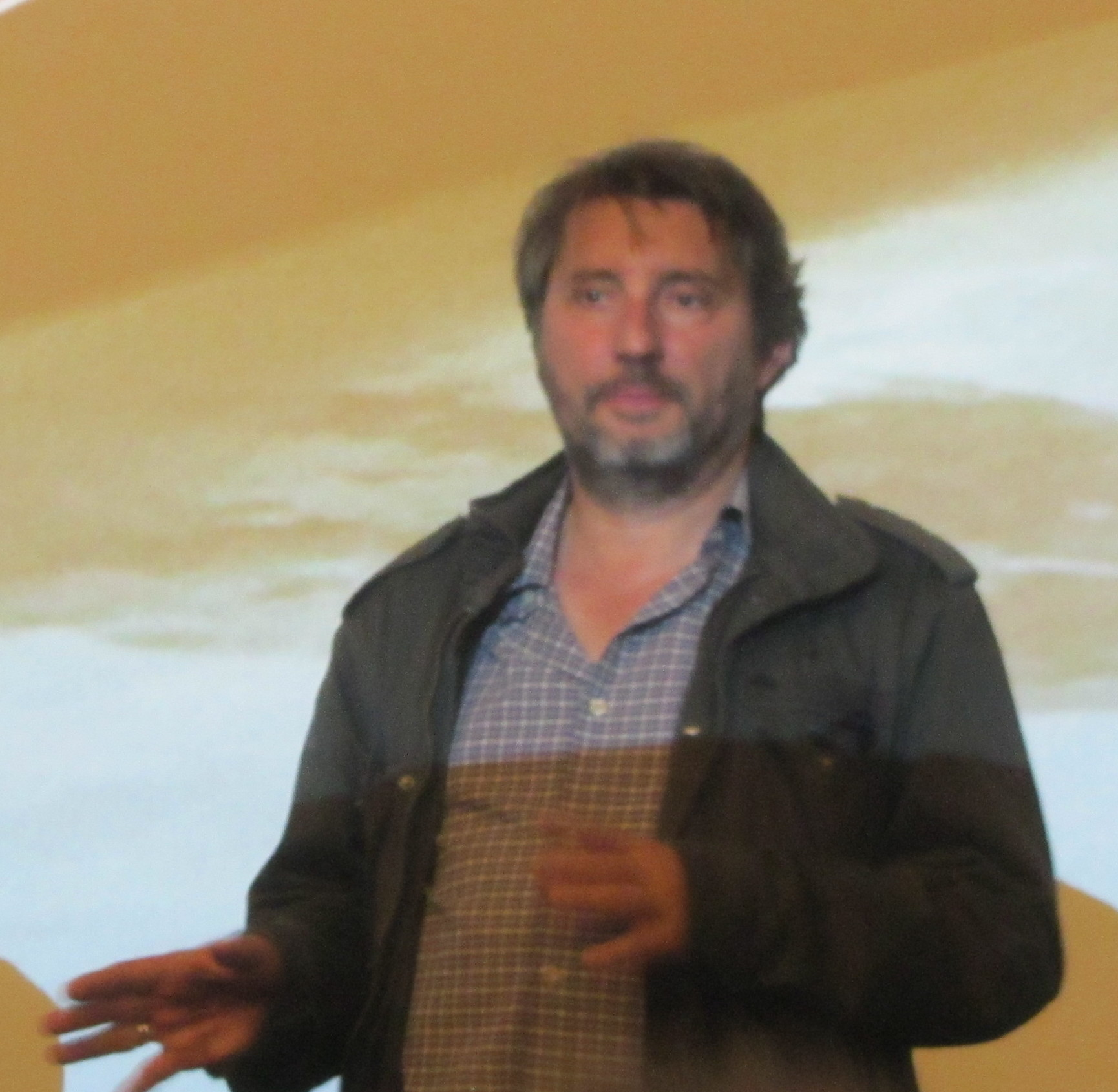 Avant première de Comme un avion à l'UGC Paris 19, Bruno Podalydès